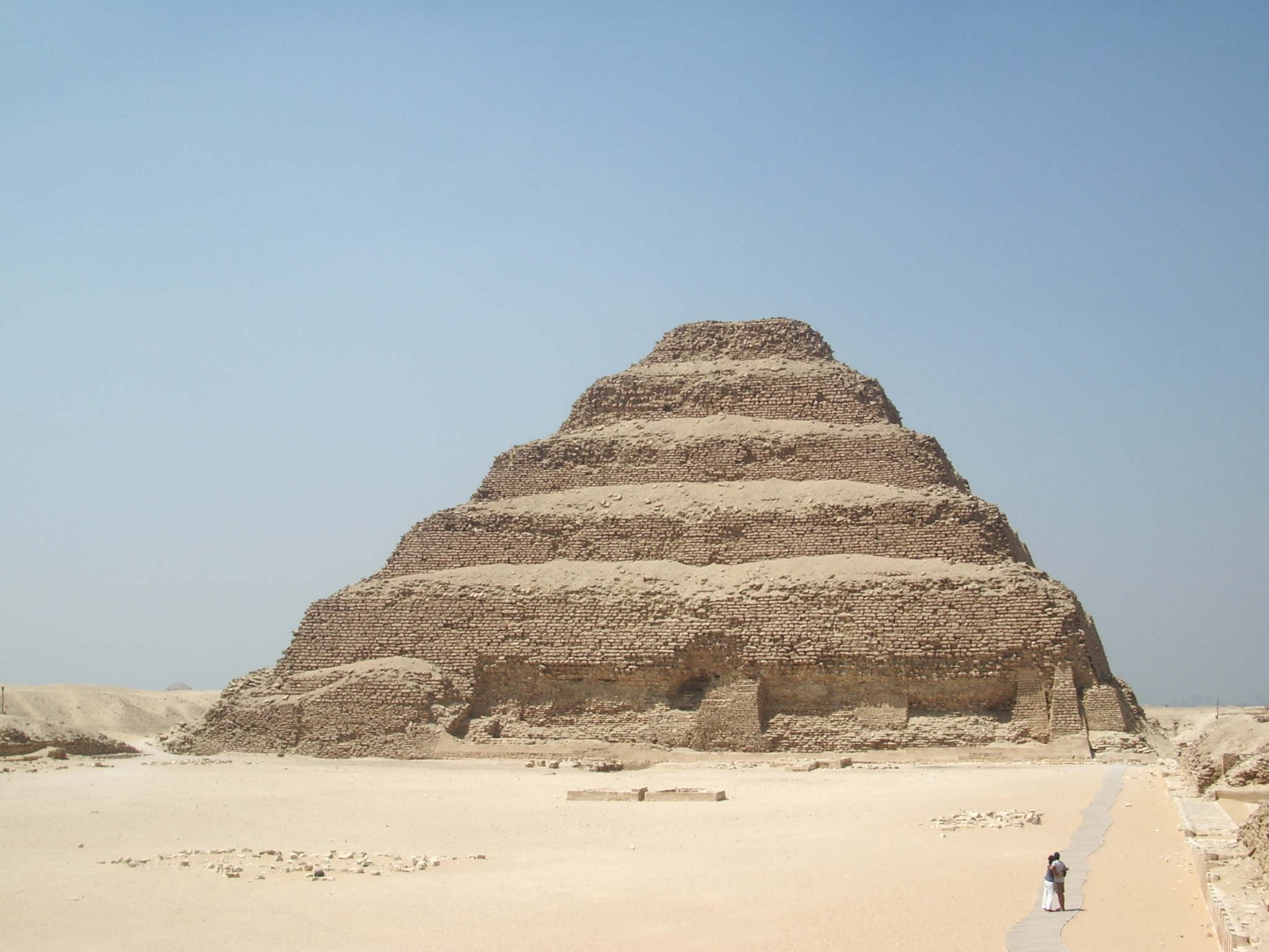 pyramide à degré de Djéser